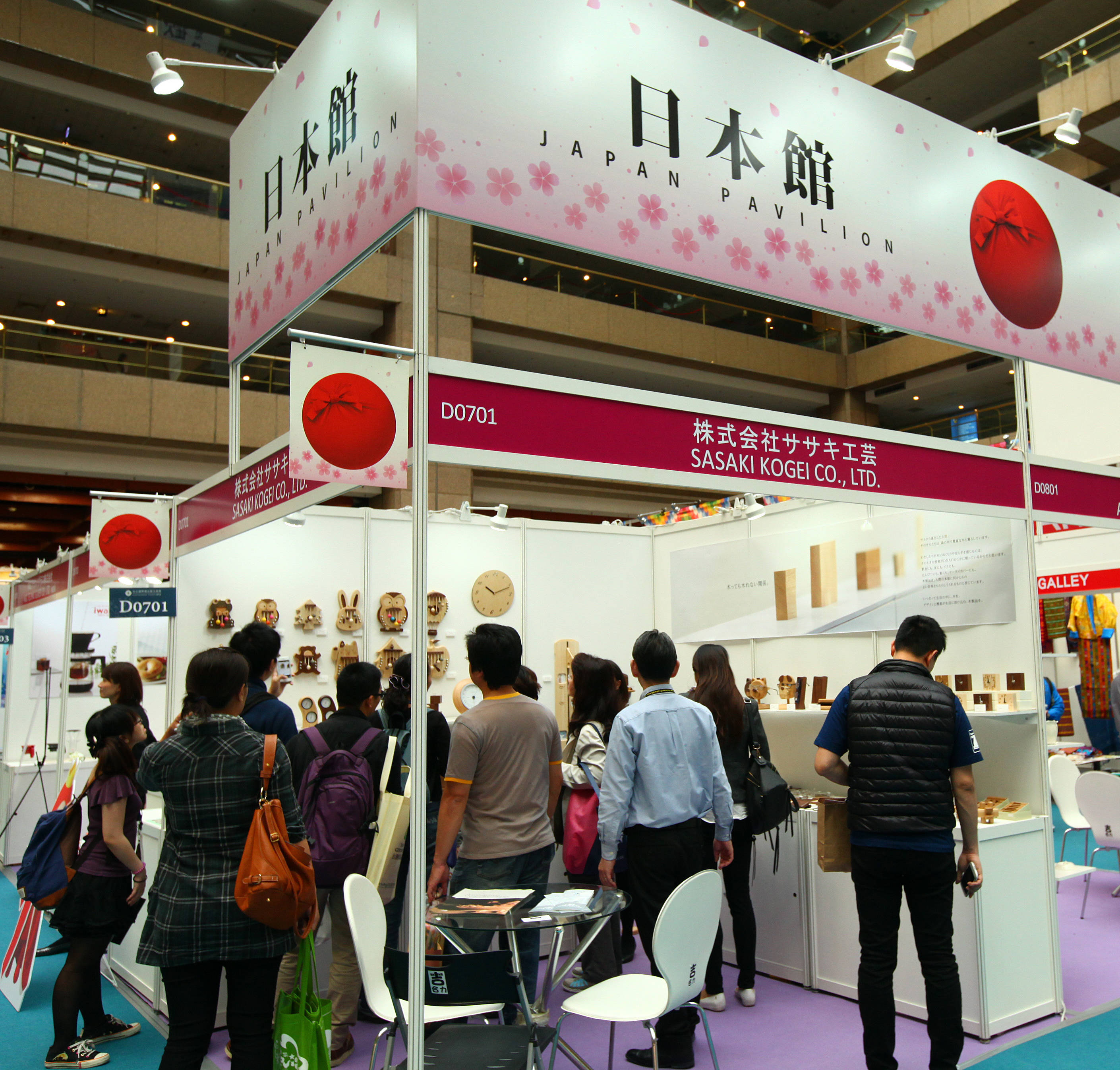 2014台北國際禮品暨文具展日本館。